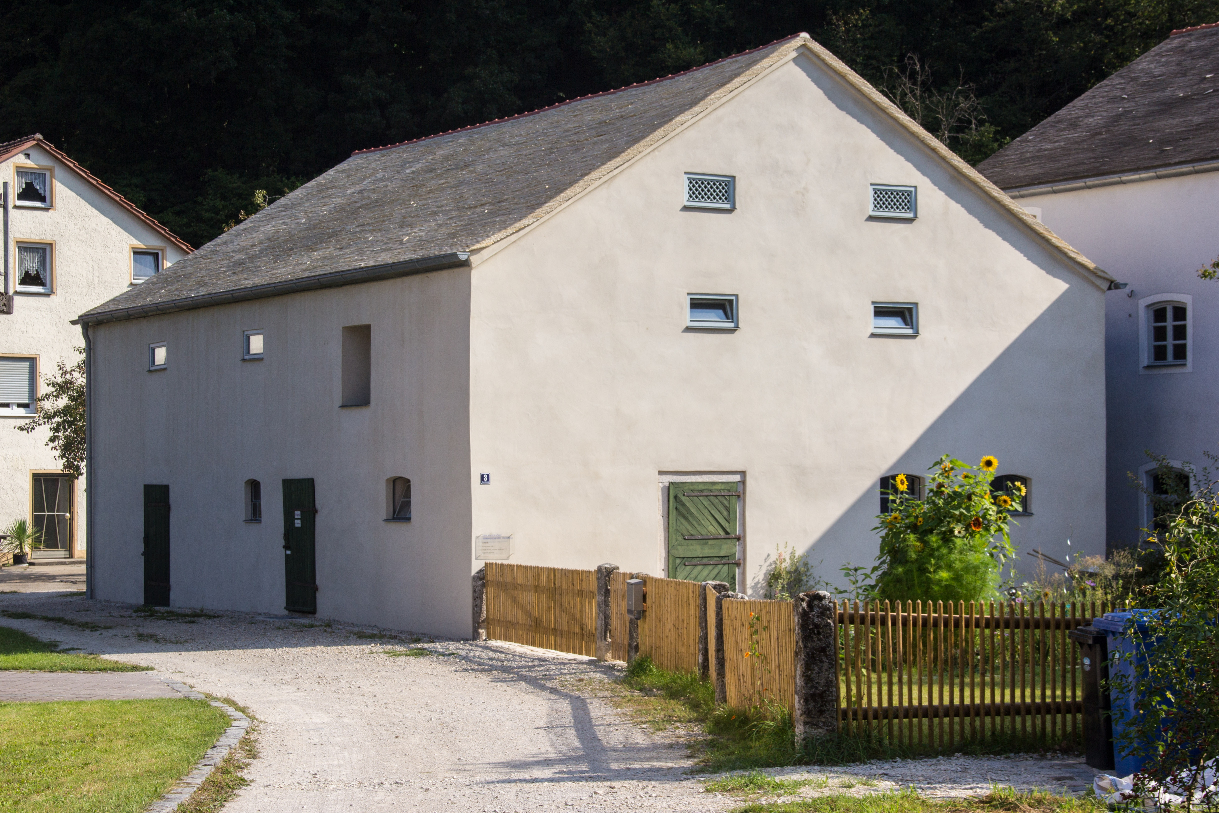 Mühlbach, Dietfurt, Ehemalige Obere Mühle, Wohn- und Mühlengebäude, zweigeschossig mit Kniestock, im Kern noch 18. Jahrhundert, 1861 giebelseitig nach Westen verlängert; mit berschlächtigem Mühlrad und Mühleneinrichtung des frühen 20. Jahrhunderts; Wirtschaftsgebäude, giebelständiger Flachsatteldachbau mit Kalkplattendach und rückwärtig gewölbten Stallungen, 1. Hälfte 19. Jahrhundert; Sägmühlstadel, hölzerne Ständerkonstruktion mit Satteldach auf Bruchsteinsockel, 18./19. Jahrhundert; Ehemaliger Stall, eingeschossiger Bruchsteinbau mit Frackdachbau, 19./20. Jahrhundert; Mühlteich, Quellenfassung mit Stau- bzw. Überlaufvorrichtung, Quadermauerwerk, wohl 18. Jahrhundert